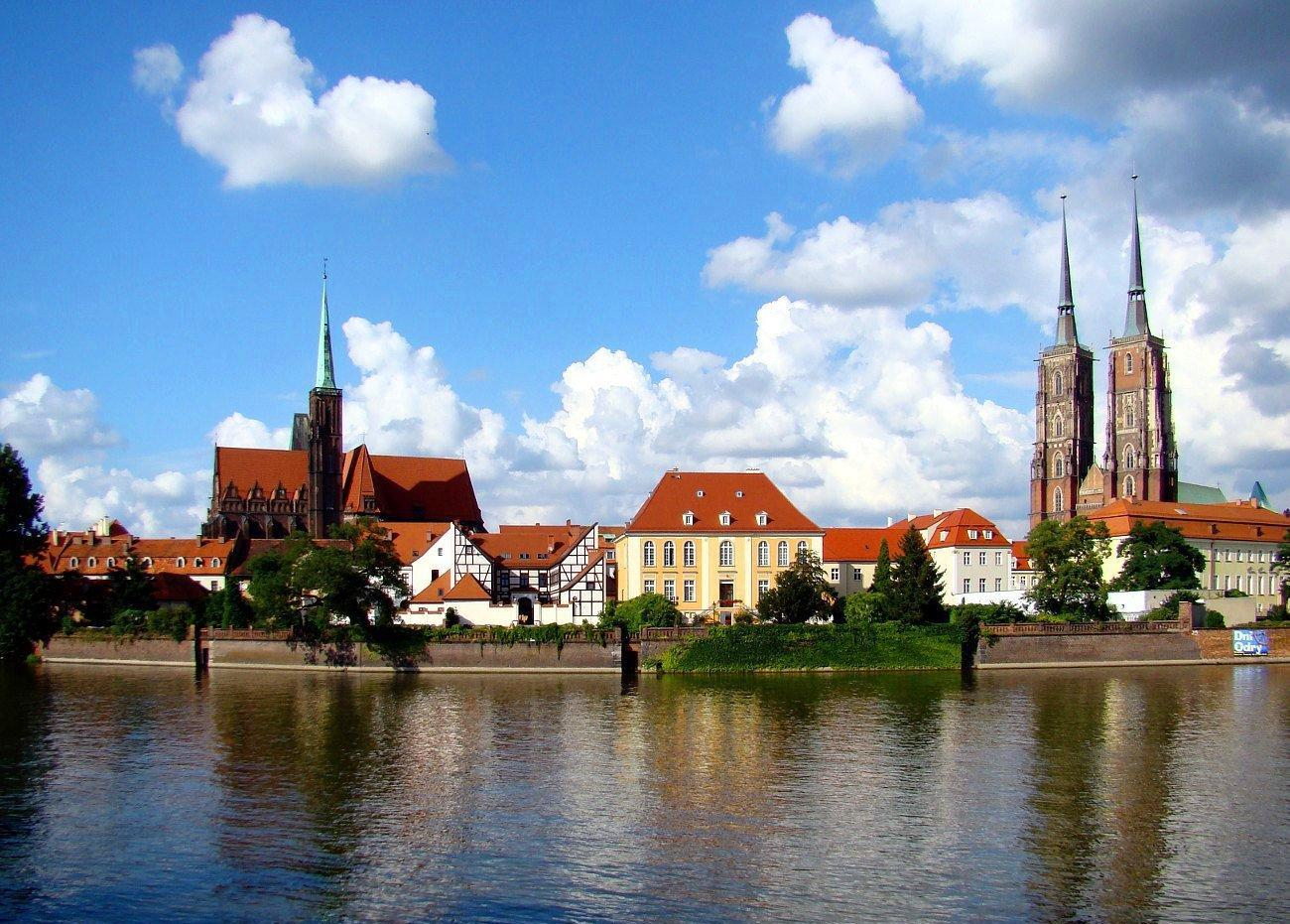 Widok na Ostrów Tumski z Bulwaru K. Dunikowskiego.